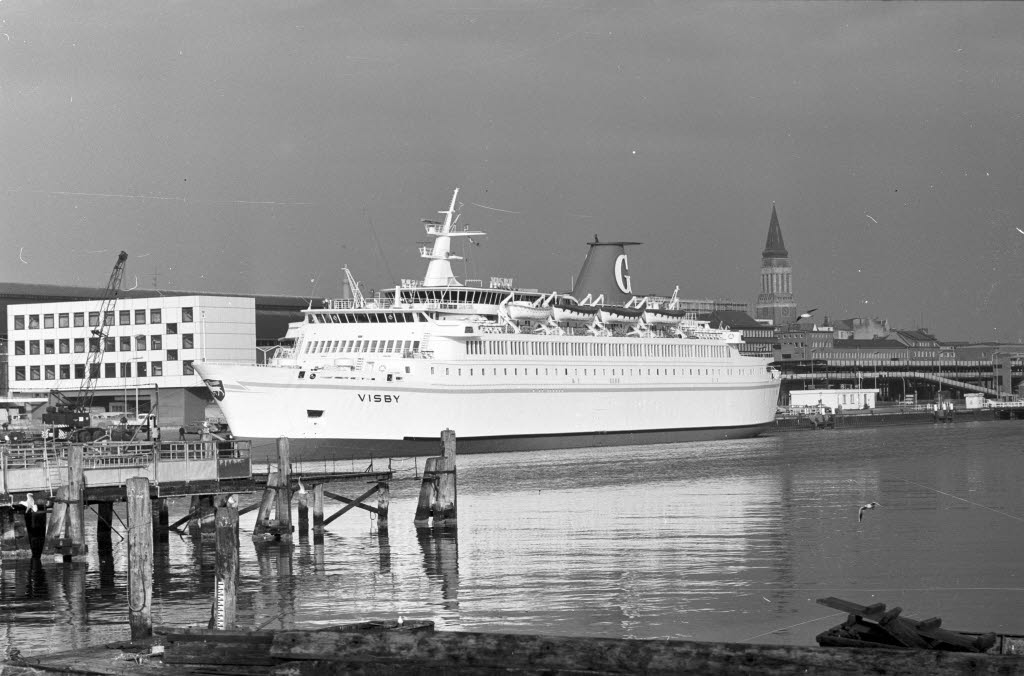 am Bahnhofskai.